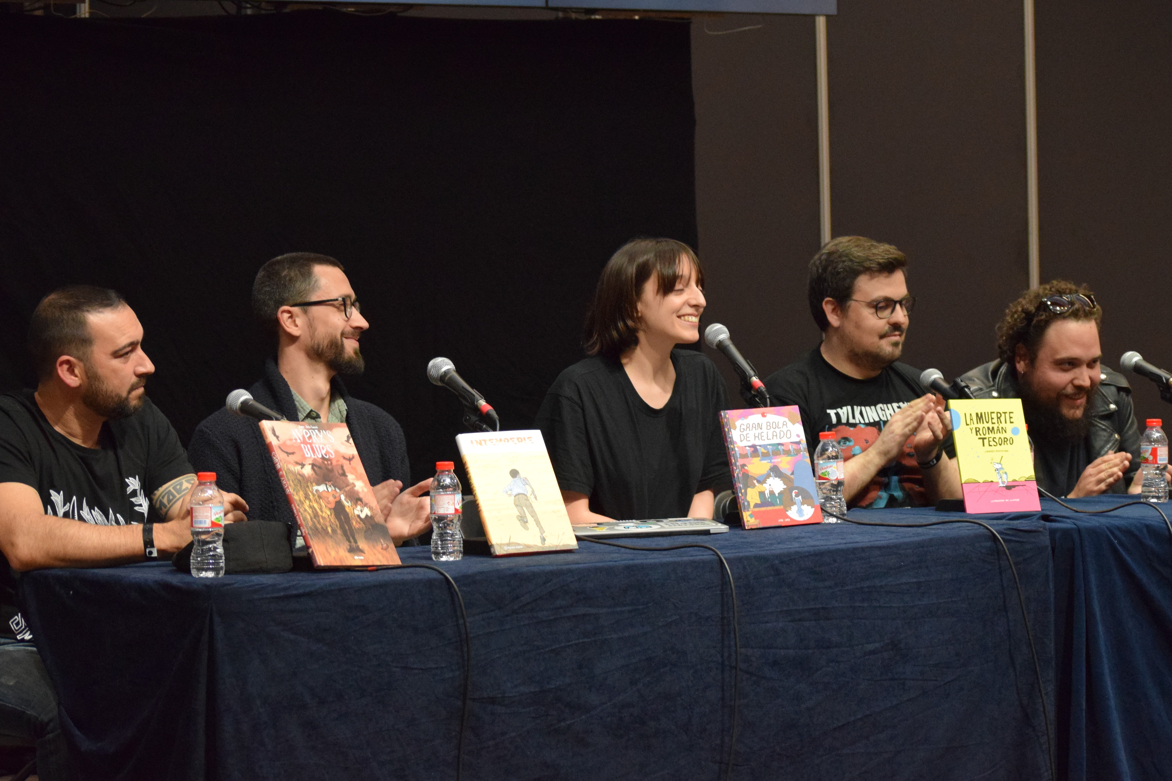 Taula rodona amb els 5 nominats al premi a l'autor revelació. D'esquerra a dreta: Angux (Avery's Blues), Javi Rey (Intemperie), Conxita Herrero (Gran bola de helado), Lorenzo Montatore (La muerte y Román Tesoro) i Víctor Puchalski (Enter the Kann). Saló Internacional del Còmic de Barcelona de 2017. Divendres 31 de març de 2017.